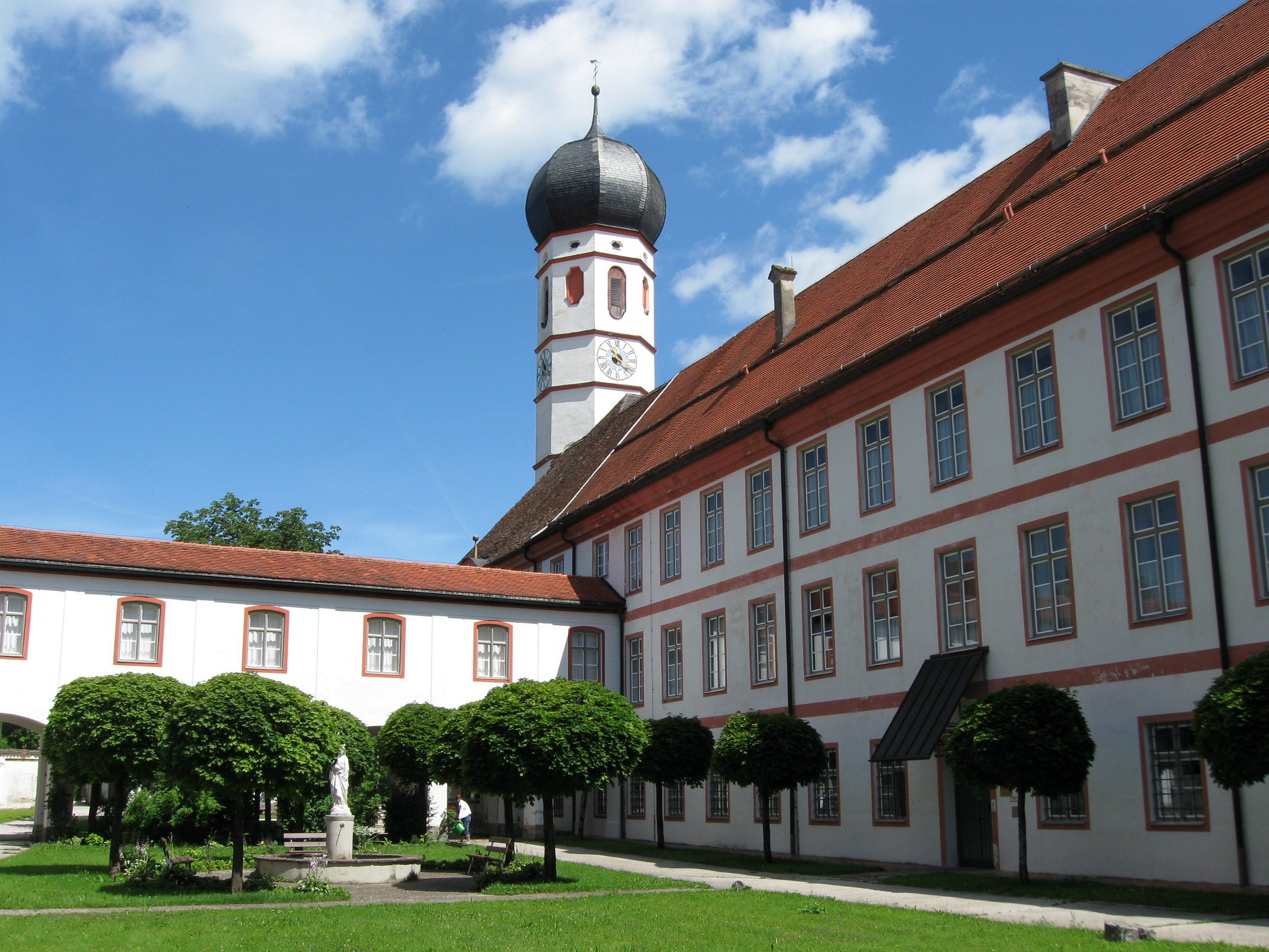 Beuerberg Königsdorfer Straße 1; Ehem. Augustinerchorherren-Stift; ehem. Stiftskirche St. Peter und Paul, jetzt kath. Pfarrkirche, barocker Wandpfeilersaal mit Abseiten, eingezogenem Chor und nordwestlichem Zwiebelturm, Neubau nach Einsturz 1629-35, 1729/30 verlängert; mit Ausstattung; Stiftsgebäude, barocke Anlage um zwei Innenhöfe, 1729-45; mit Ausstattung; kath. Konventkirche Mariä Heimsuchung, Saalbau mit dreiseitigem Chorschluss und Empore, 1846; mit Ausstattung; Klostermauer, verputzte umlaufende Mauer, um 1745.